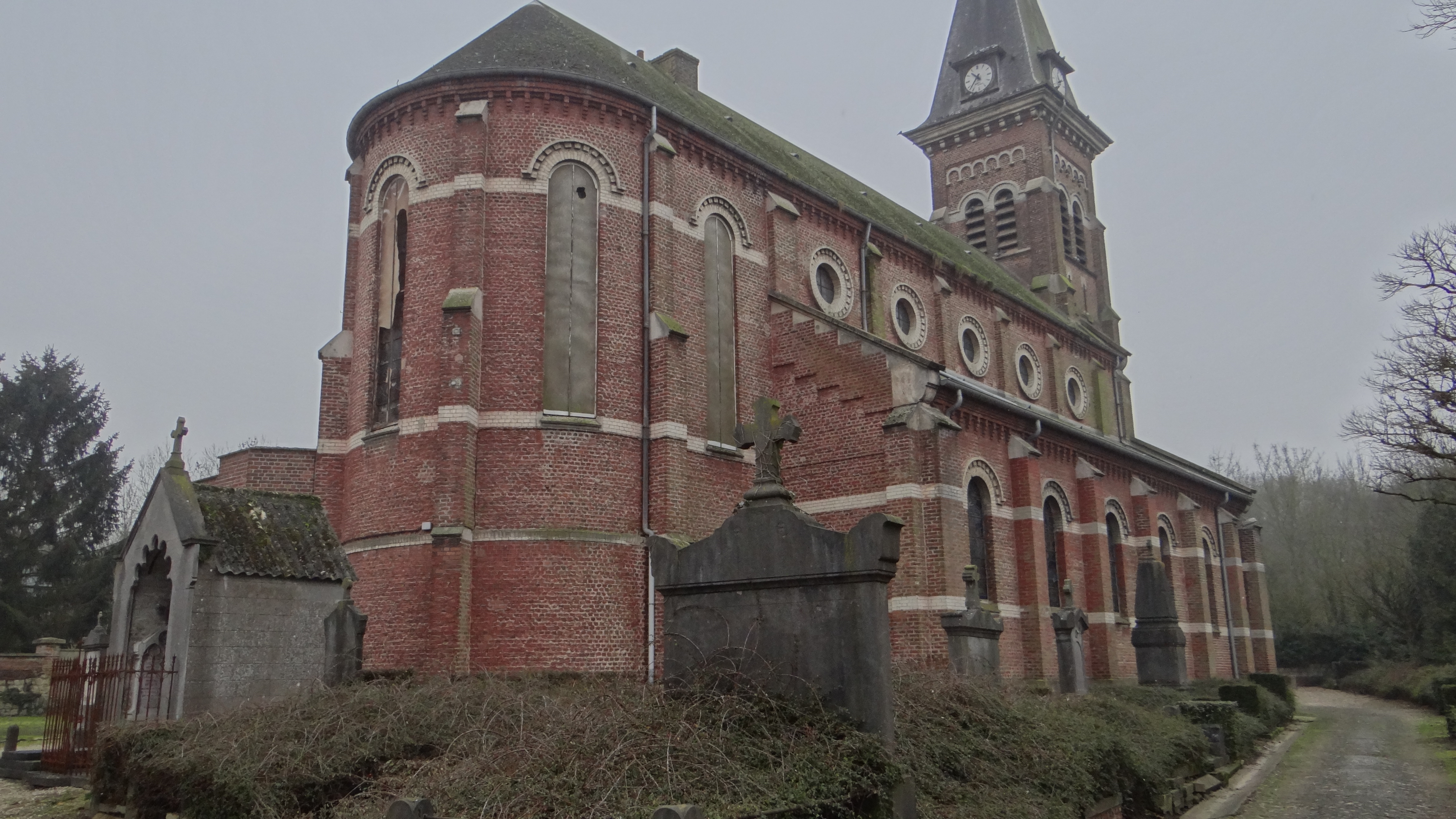 Lécluse - l'église